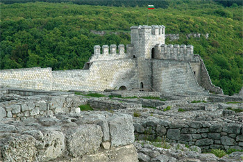 Крепост край град Шумен, България; 2006 Пламен Ташев